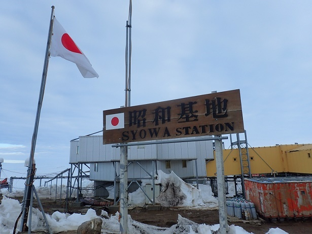 19広場にたっている昭和基地の看板。後ろは管理棟。